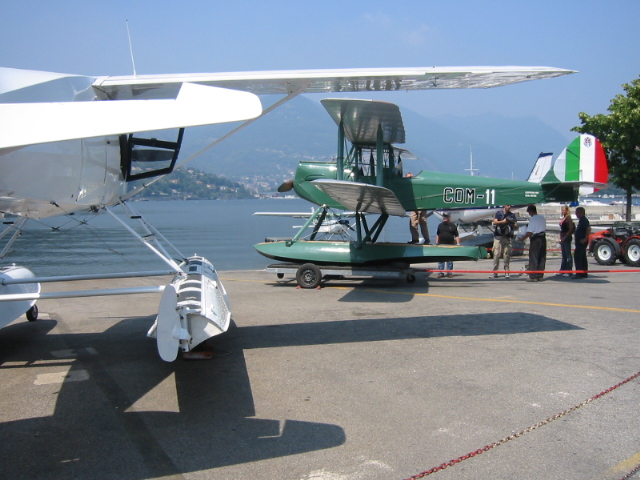 Hydravion biplan de l'aéroclub du lac de Come en Italie